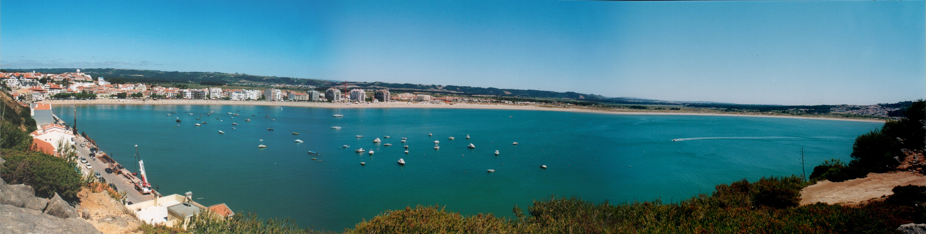 Vista panorâmica da baía de São Martinho do Porto, Alcobaça - Portugal.